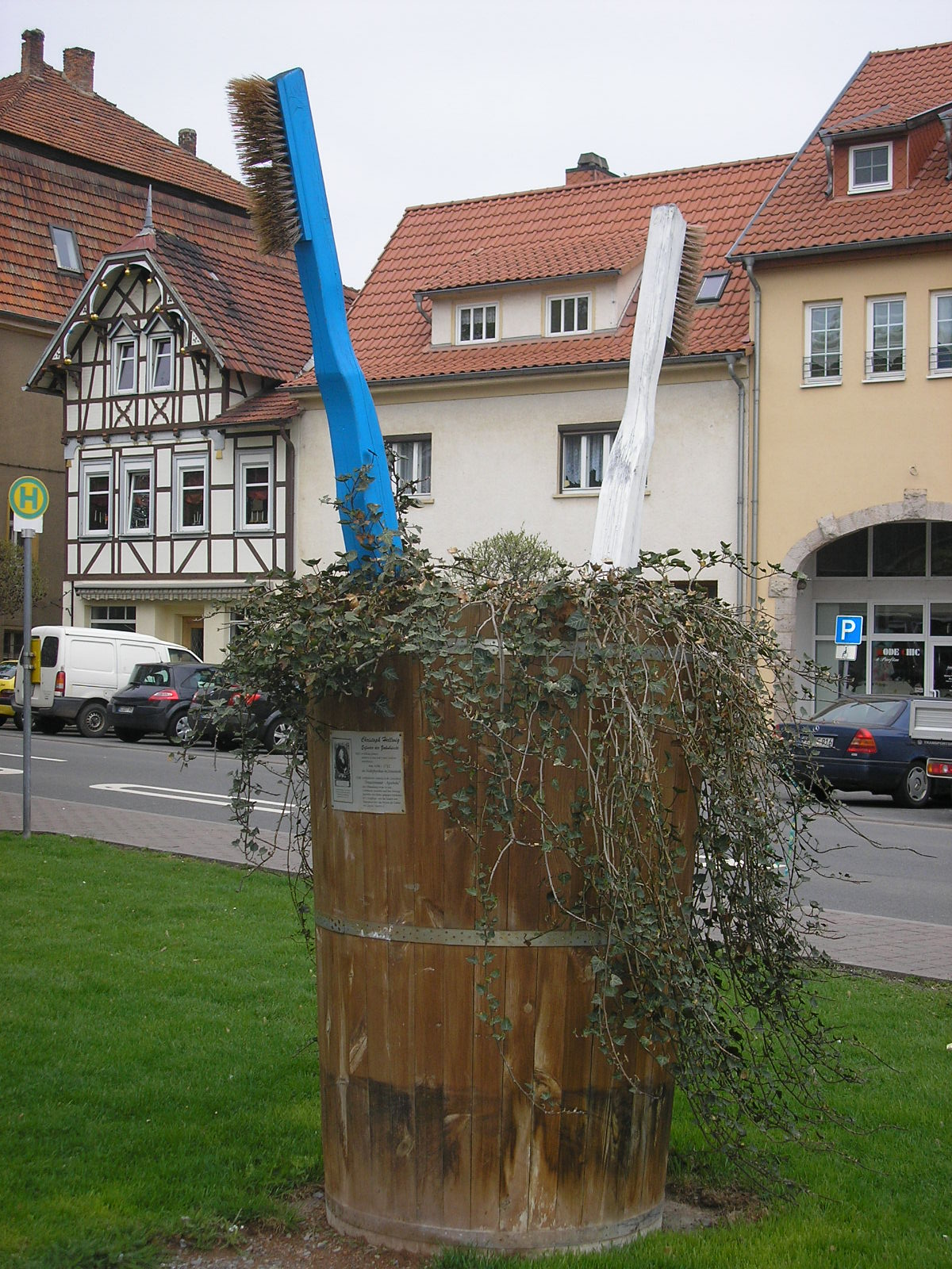 Denkmal für den Erfinder der Zahnbürste in Bad Tennstedt (Thüringen).